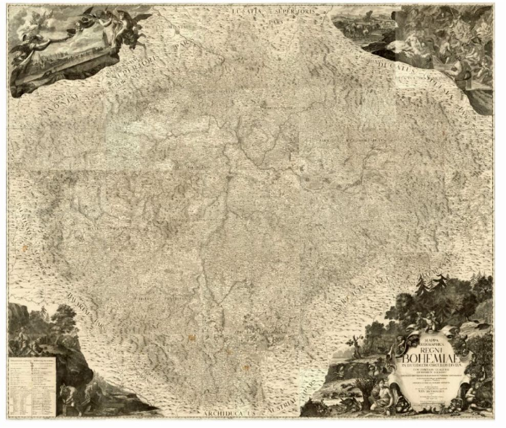 Mapa Čech vytvořená Janem Kryštofem Müllerem